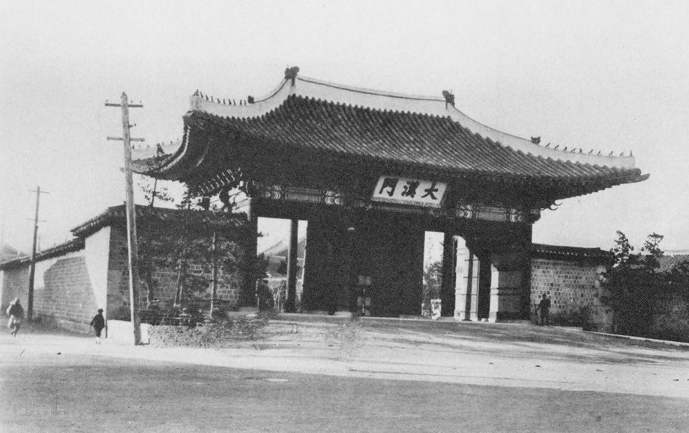 徳寿宮大漢門